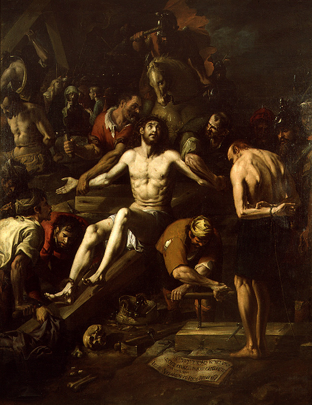 La obra muestra a los verdugos encargados de la crucifixión de Jesucristo haciendo los últimos preparativos para llevarla a cabo.